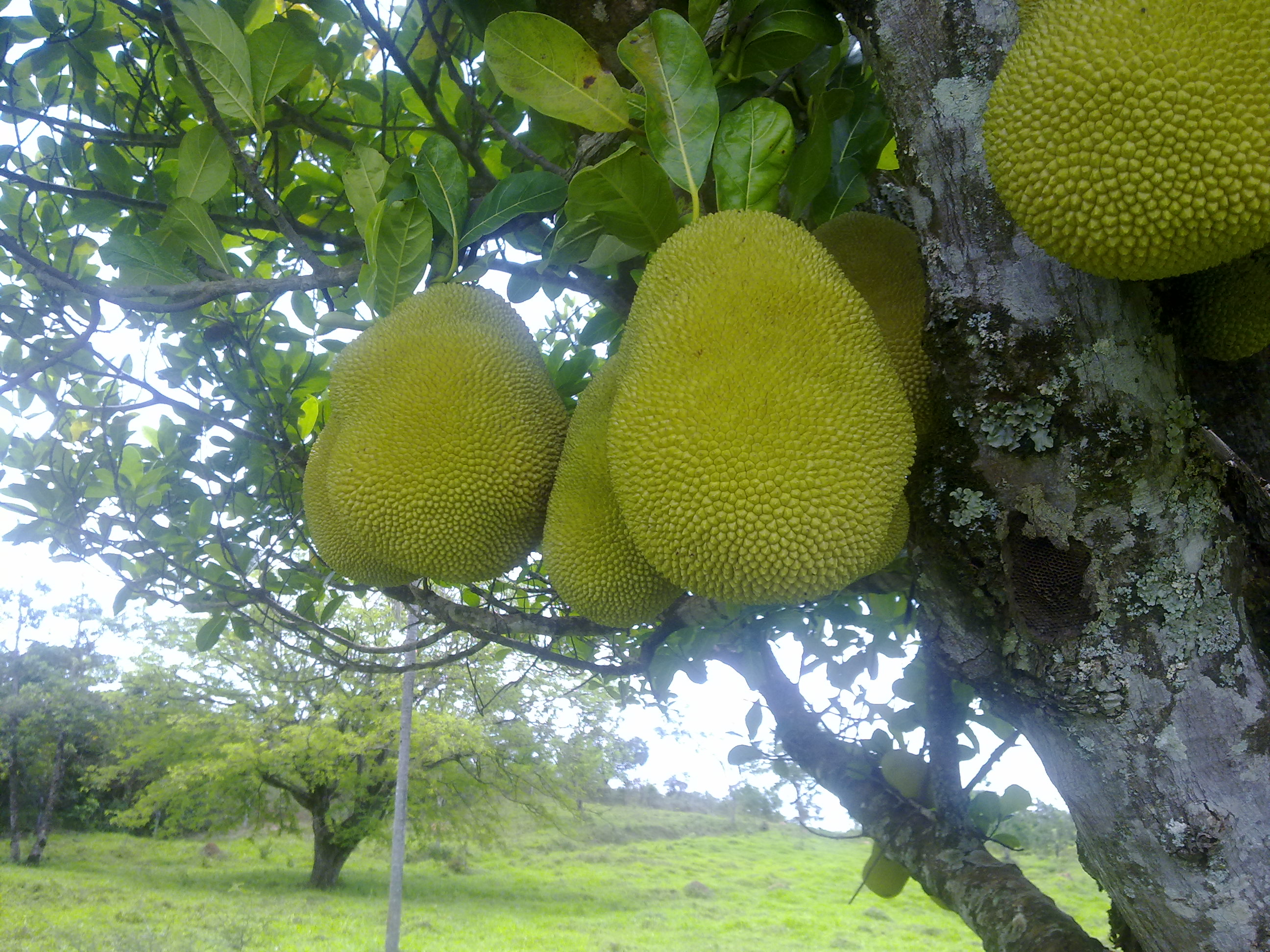 Douradinho